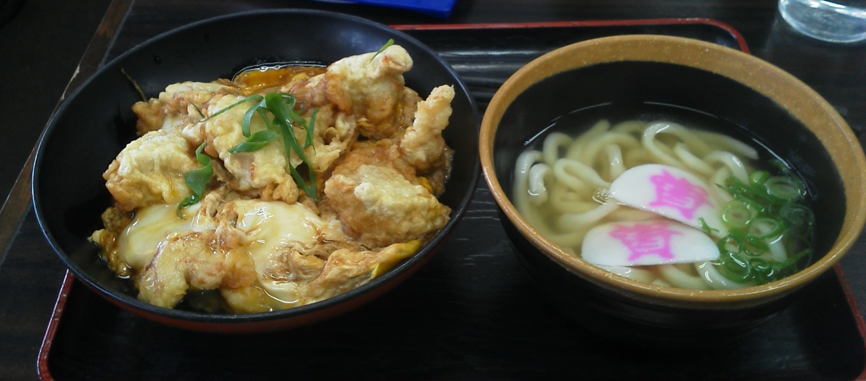 資さんうどんでの、鶏天とじ丼とミニうどんのセット。